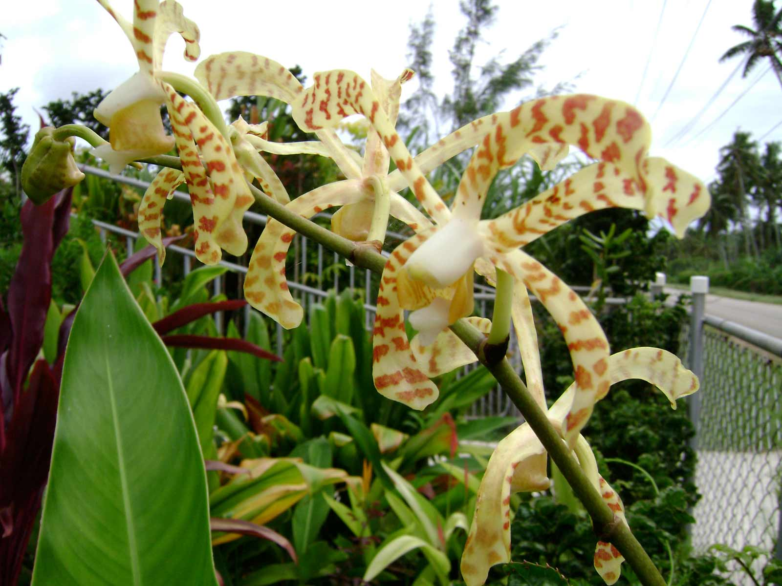 Arachnis × maingayi; in a Tongan garden